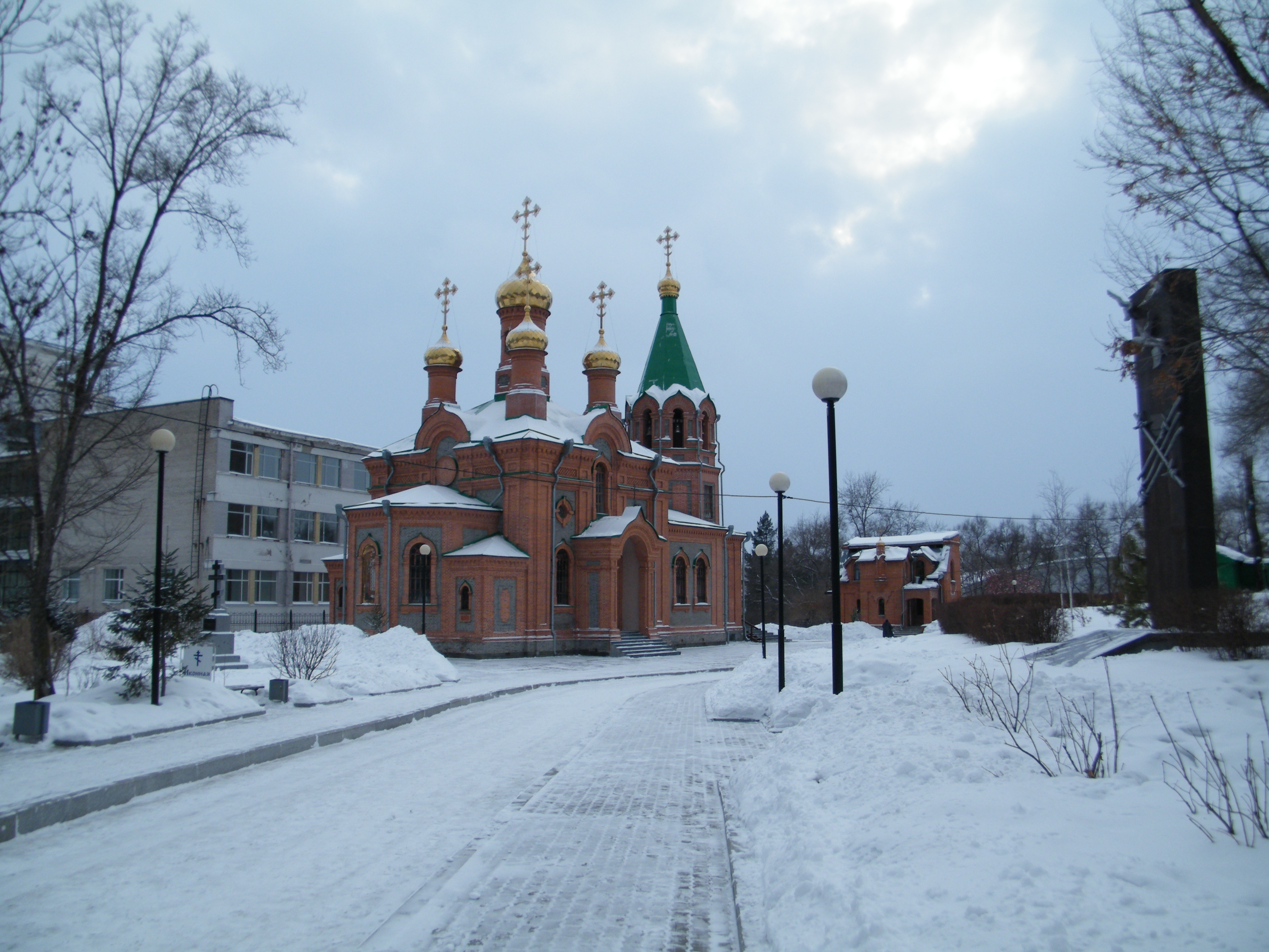 Иннокентьевский храм в Хабаровске. Назван в честь Иннокентия, епископа Иркутского и Нерчинского. Первая каменная церковь Хабаровска, построена во второй половине XIX века. В 1960-е - начале 1990-х годов в здании размещался планетарий.